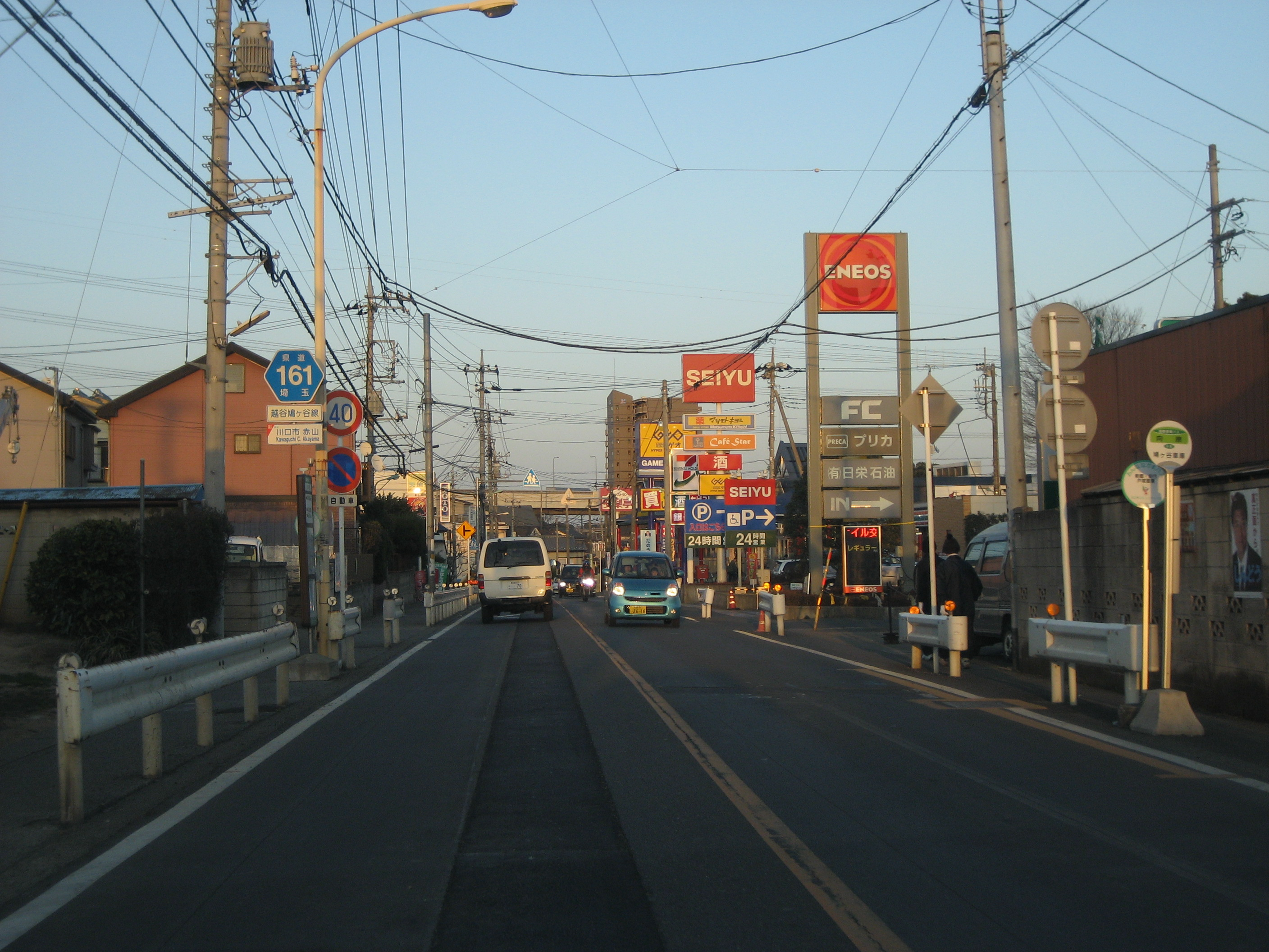 埼玉県道161号線川口市内